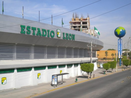 Estadio León en el año 2010